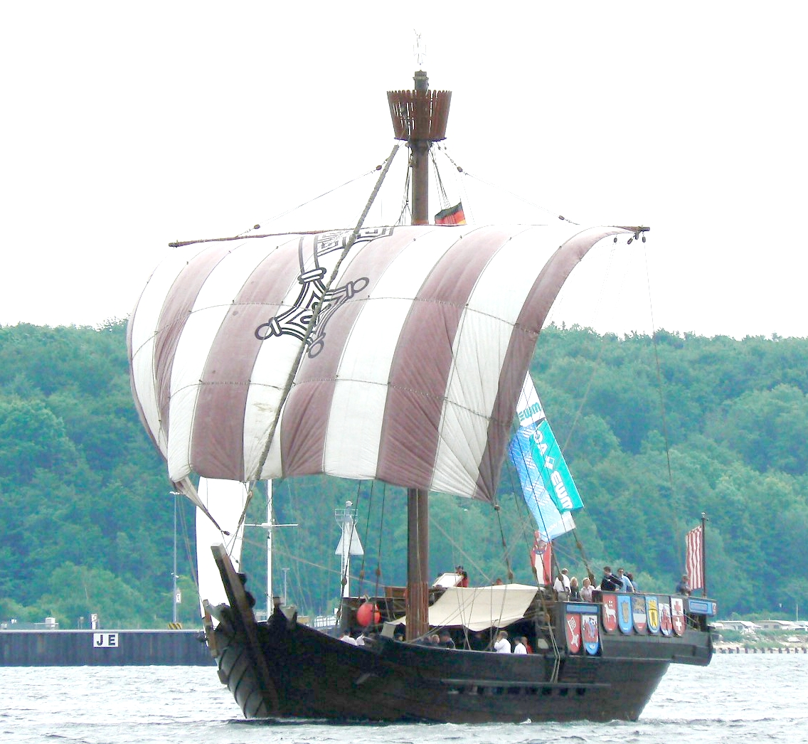 Segelschiff (Kogge) Ubena von Bremen auf der Kieler Woche 2007. Die Kogge ist ein Nachbau der 1962 gefundenen Bremer Hansekogge. Bauzeit: 1988-91. Rechts am Bildrand der Bug der Amphitrite.